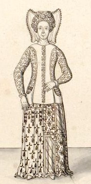 Marguerite de Bourgogne (1393-1441)